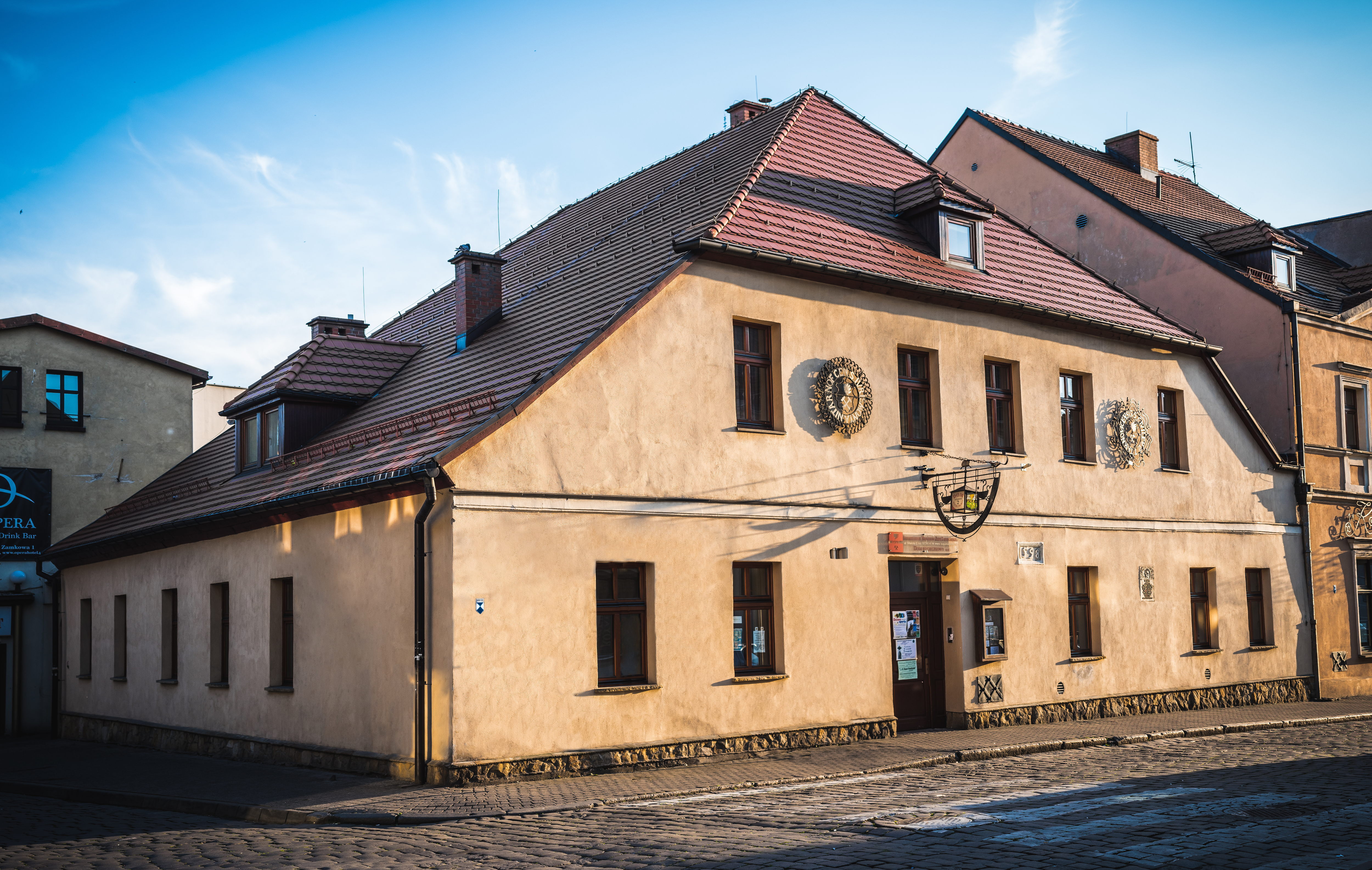 Dzom Gwarka w Tarnowskich Górach - Siedziba Stowarzyszenia Miłośników Ziemi Tarnogórskiej